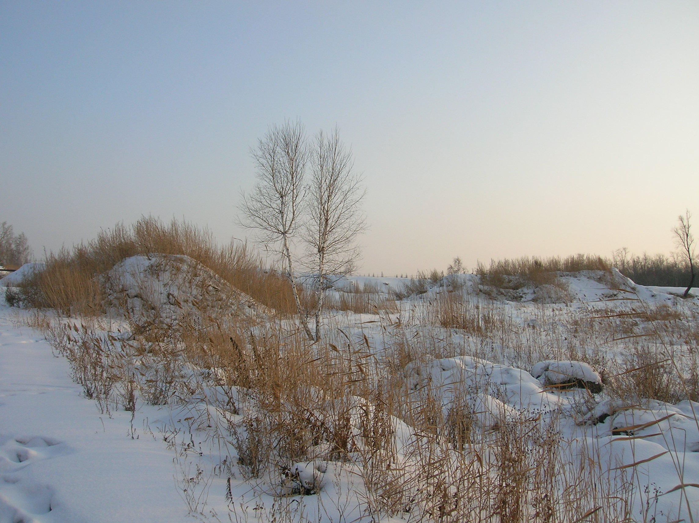 Природный парк «Птичья гавань» зимой.